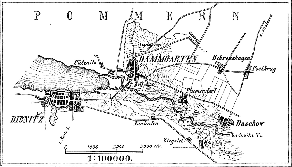 Das Gefecht des Schill-Korps bei Dammgarten am 24. Mai 1809